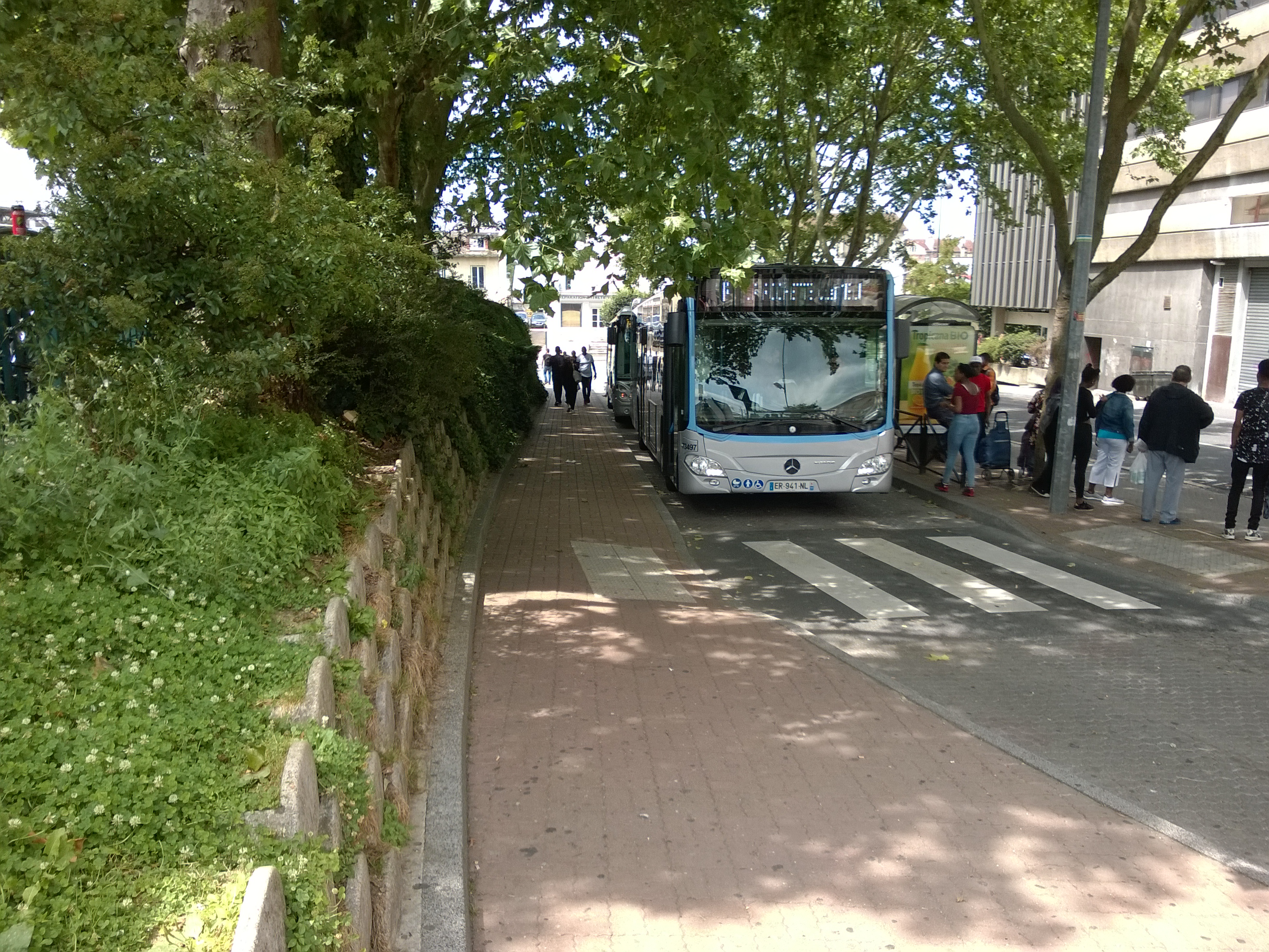 Gare routière de la gare de Melun, département de la Seine-et-Marne, France. Mercedes-Benz Citaro C2 assurant une course de la ligne F pour Rocheton - Stae.